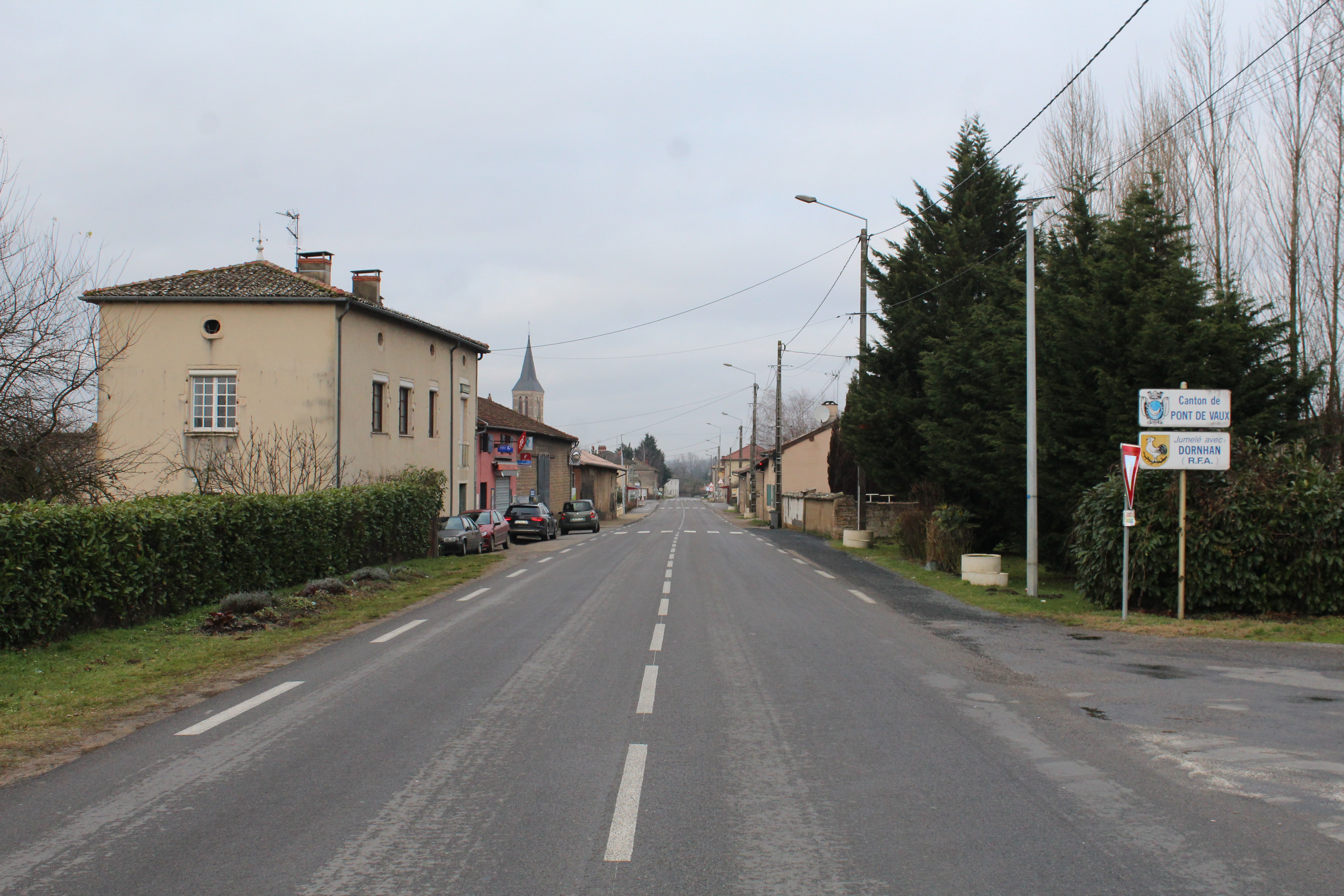 Route départementale D933 à Ozan.